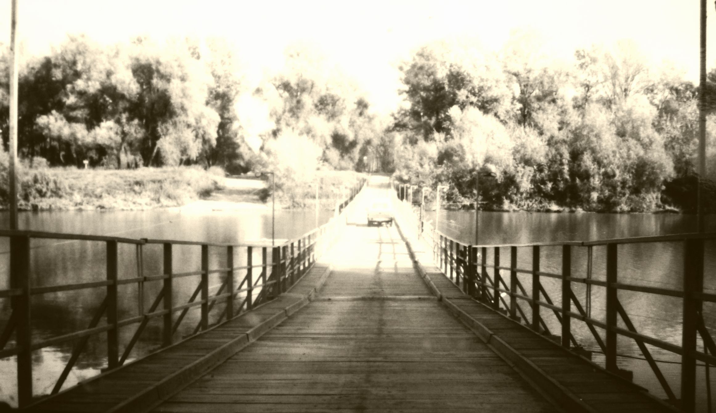 Egykori pontonhíd Cigánd és Dombrád között a Tiszán. A híd 1952 és 1994 között volt üzemben. A fotó 1994-ben készült.